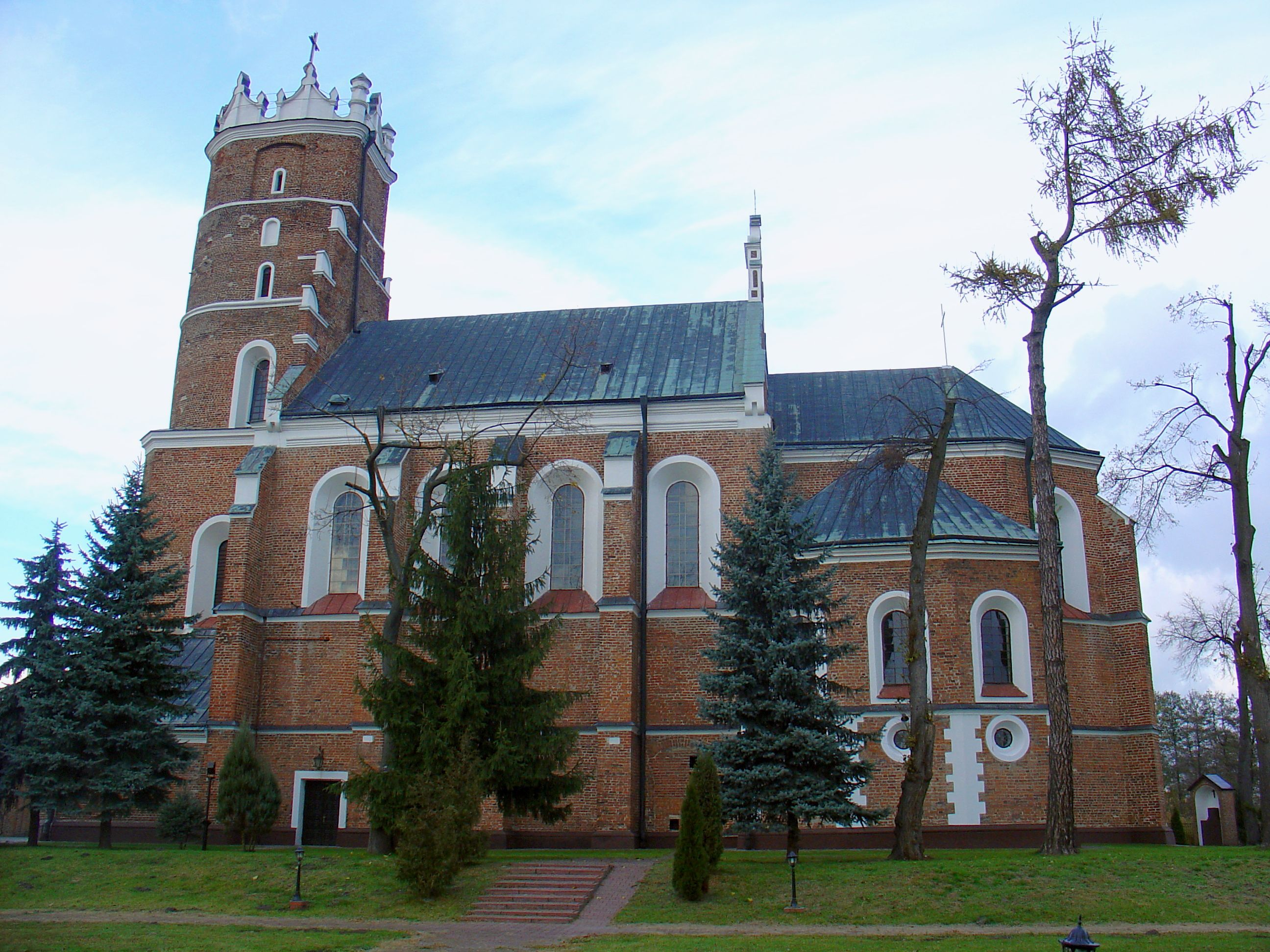 Zespół kościoła par. p.w. Św. Trójcy i NMP: - kościół par. p.w. Św. Trójcy i NMP (1541-84, XIX, XX) - cmentarz - ogrodzenie z bramą i kapliczkami (XVII) Chodel, Chodel